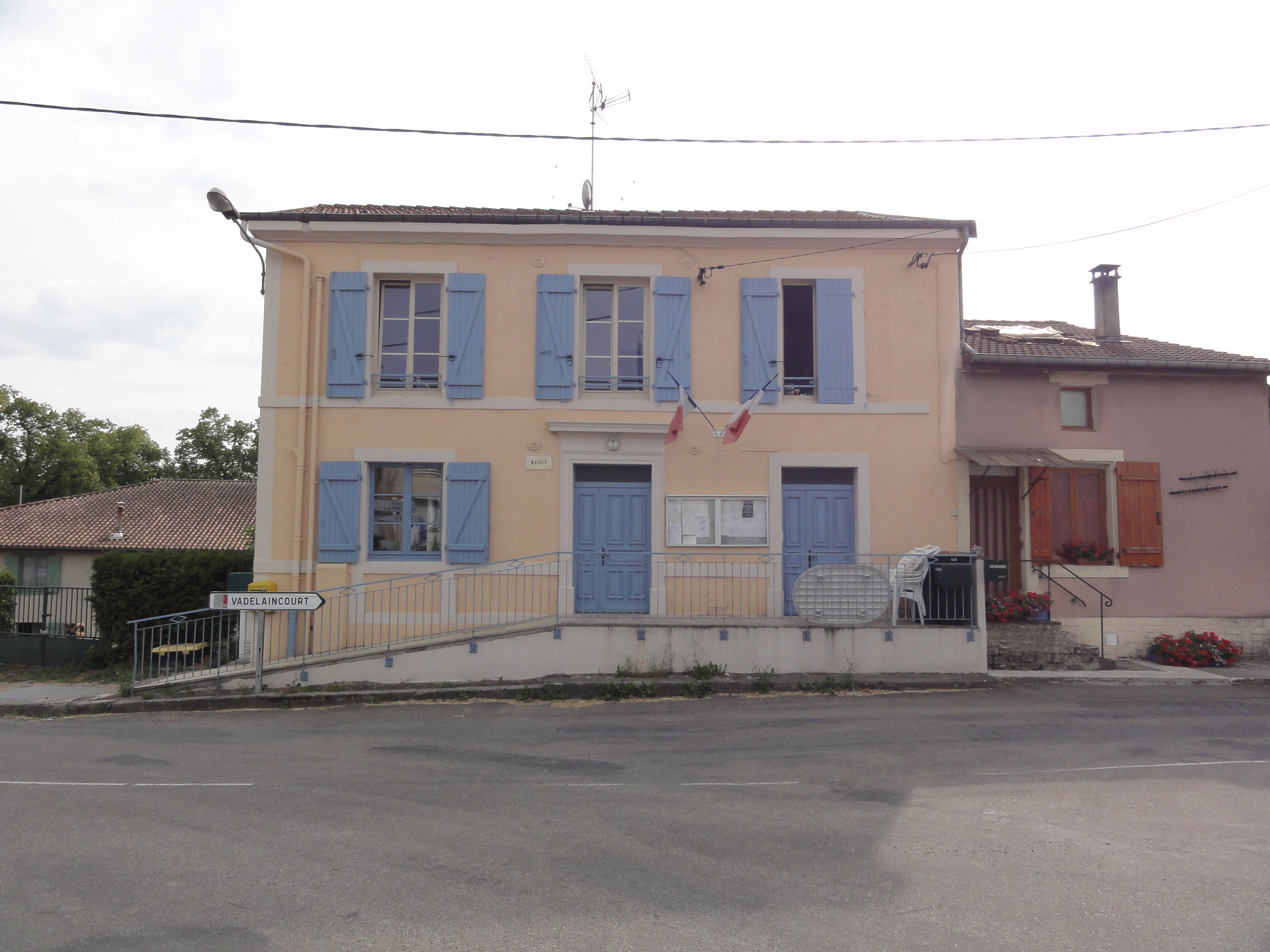 Vadelaincourt (Meuse) mairie